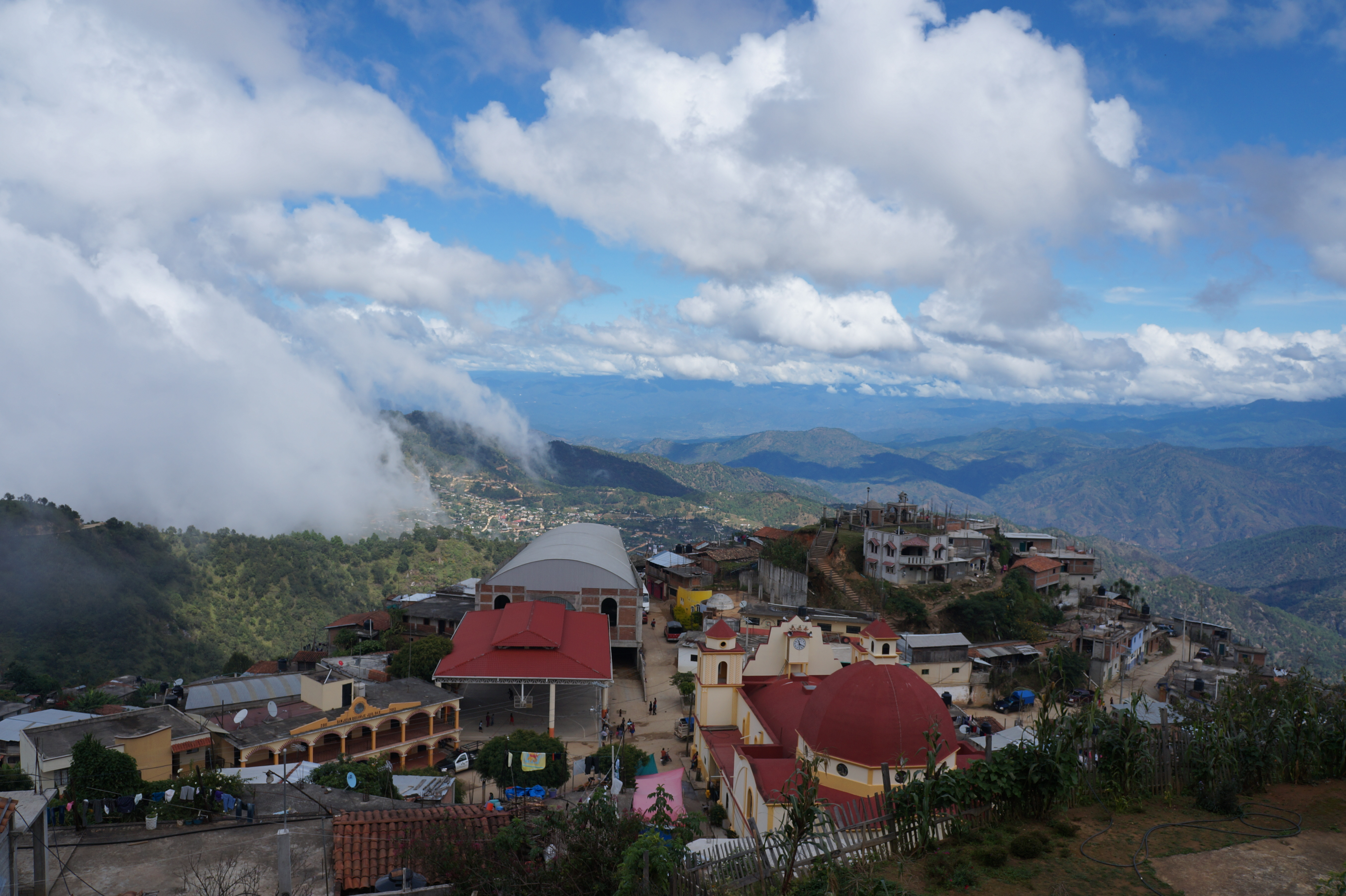 san Juan Quiahije